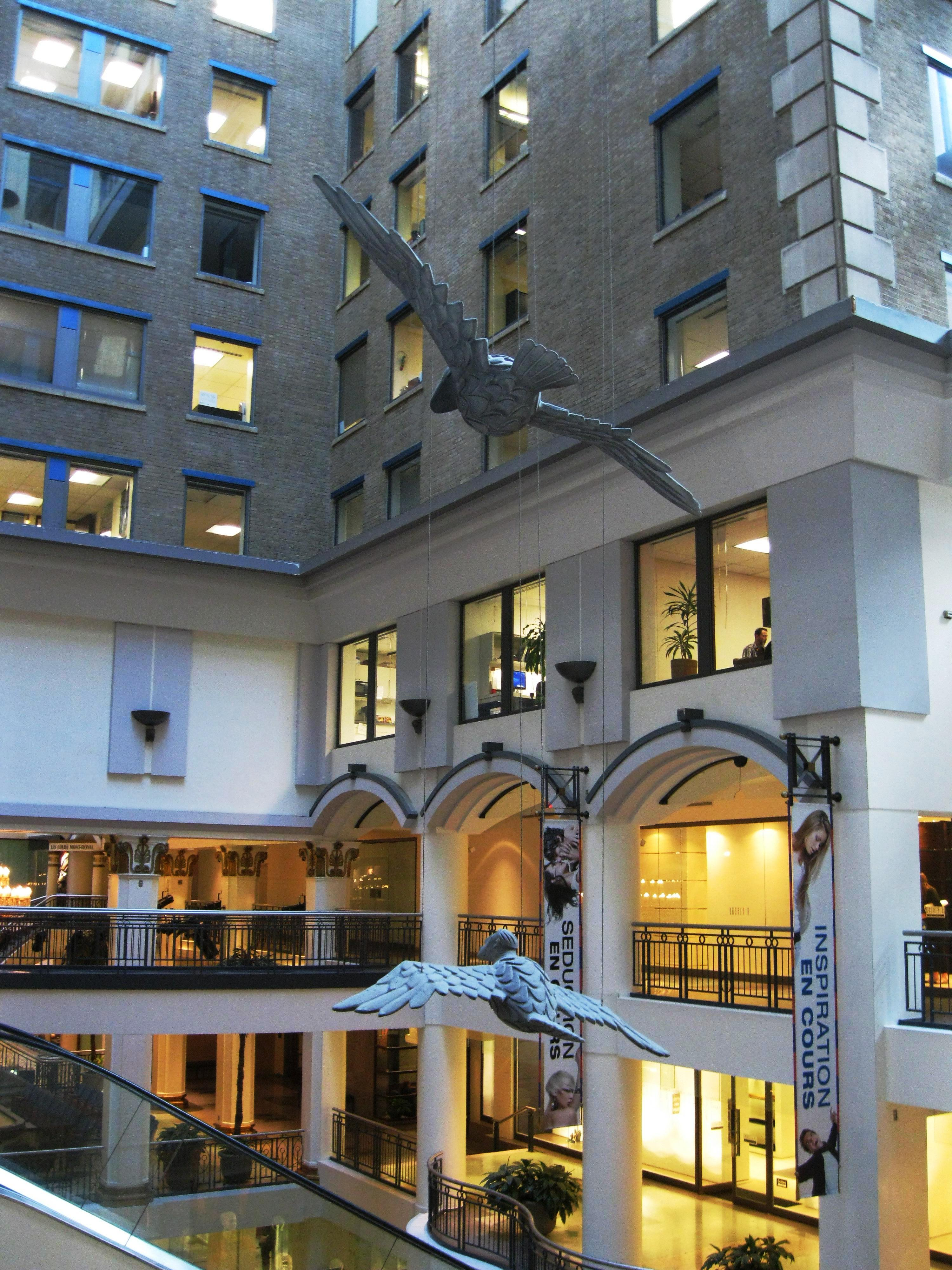 Cours Mont-Royal : Sculptures suspendues, Hommes oiseaux de David Ruben Piqtoukun Les sculptures d’hommes oiseaux, ou tingmiluks, représentent des chamans transformés en créatures ailées, propulsées par le dieu du vent inuit, Sila.